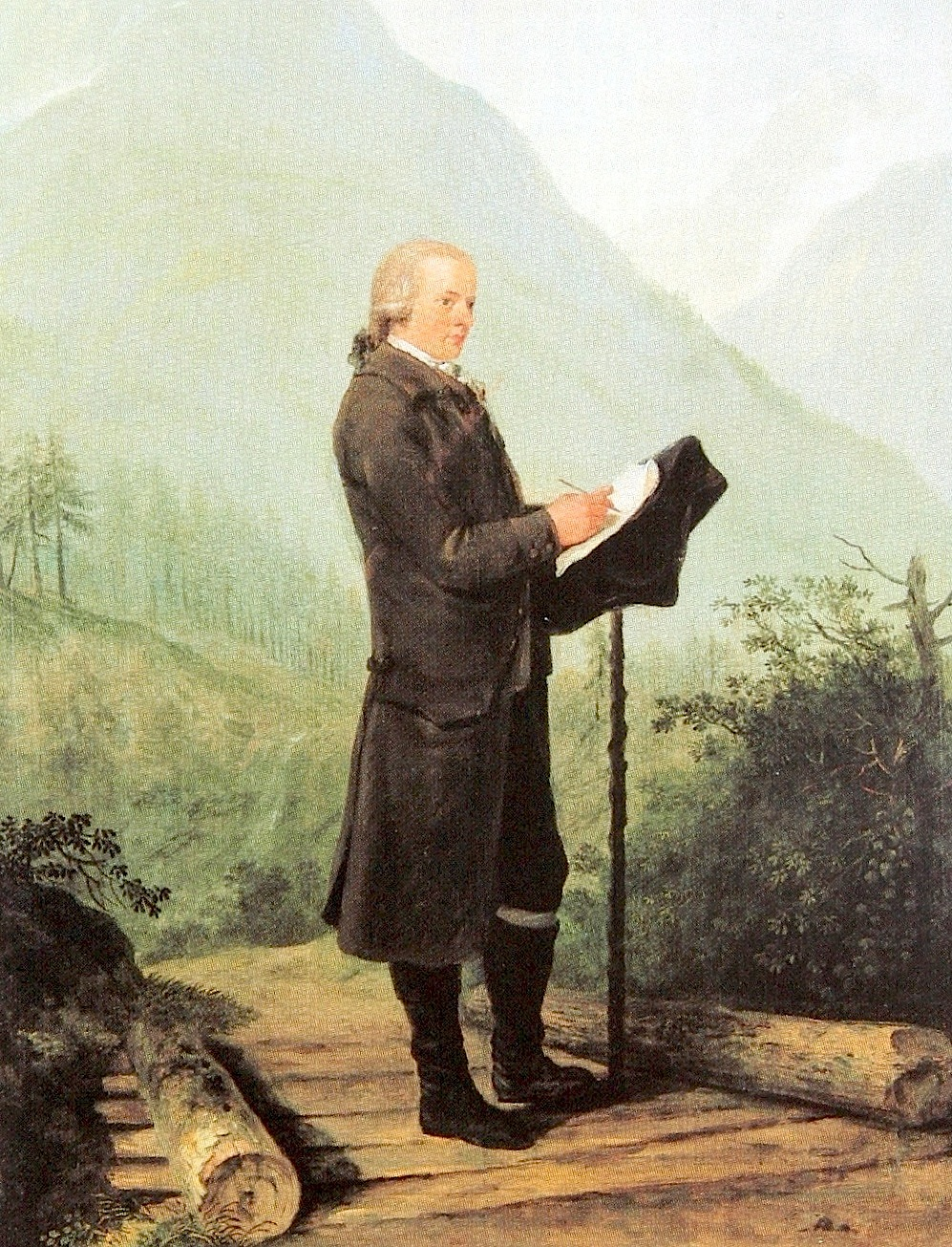 Ludwig Hess um 1790, Gemälde von Heinrich Freudweiler, Oel auf Holz